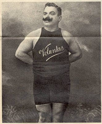 Carlo Airoldi - Voluntas